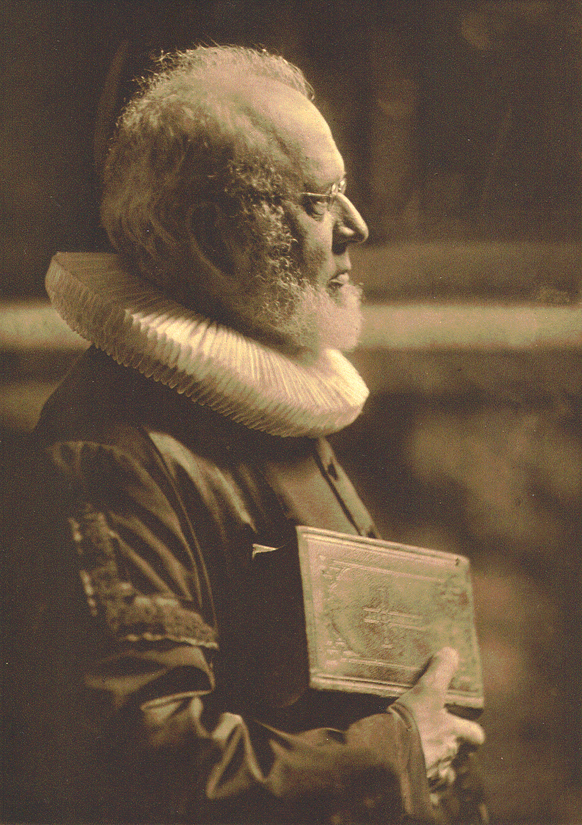 Theodor Paul Oskar Arthur von Broeker (1846-1915), Hauptpastor an St. Jacobi